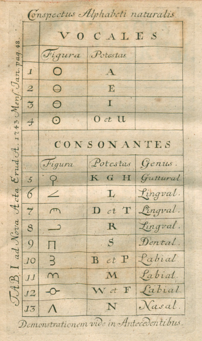 Illustration